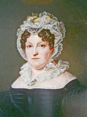 'Betty' Heine, geb. Goldschmidt (Frau von Salomon Heine, Tante von Heinrich Heine), um 1830, Öl/Lwd., Künstler unbekannt (evtl. Gröger Werkstatt), Verein Heine Haus. Das Bild ist im Besitz der Jüdischen Gemeinde Hamburg und wurde 2015 an den Verein Heine-Haus zur Präsentation im Hamburger Heine-Haus übergeben.